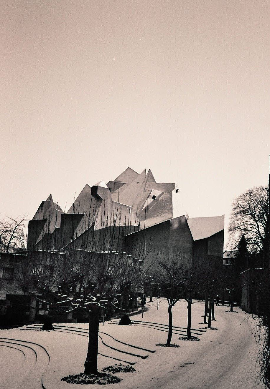 Der Wallfahrtskirche "Mariendom" in Neviges, eigenes Bild